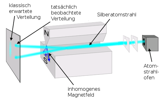 schematische Darstellung des Stern Gerlach Experiments